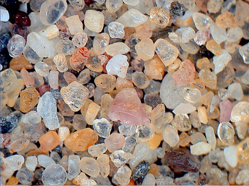 Sand-Afrika-Senegal-Yoff -Dakar